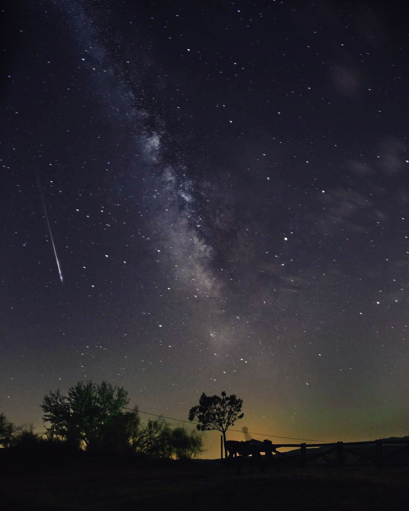 Encinasola, Huelva, debido a su aislamiento geográfico, dentro del mismo parque natural Sierra de Aracena y Picos de Aroche, es uno de los puntos con menos contaminación lumínica de España y Europa